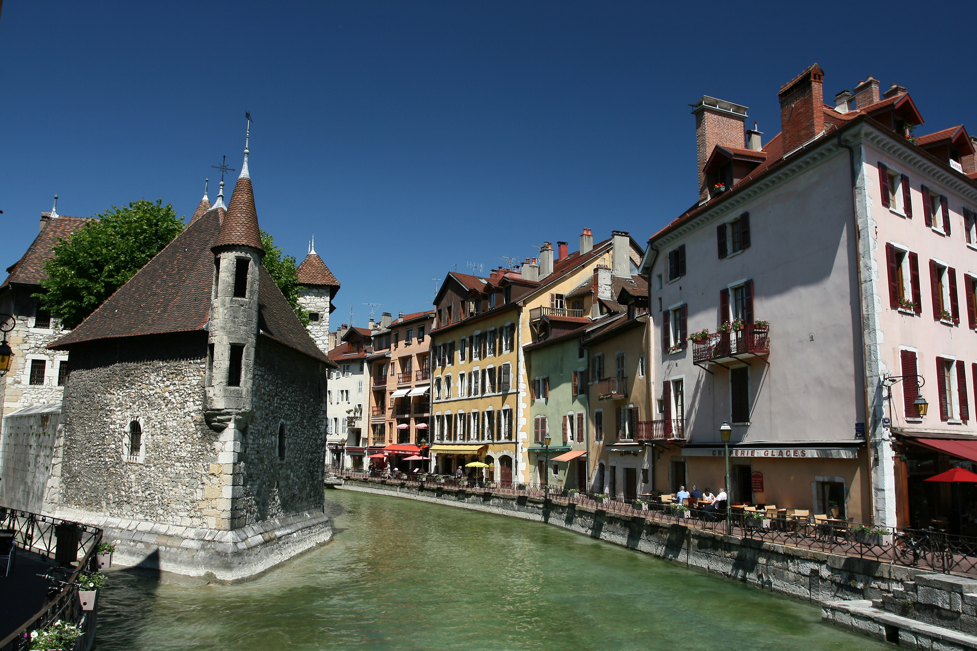 Palais de l'Isle et le Thiou